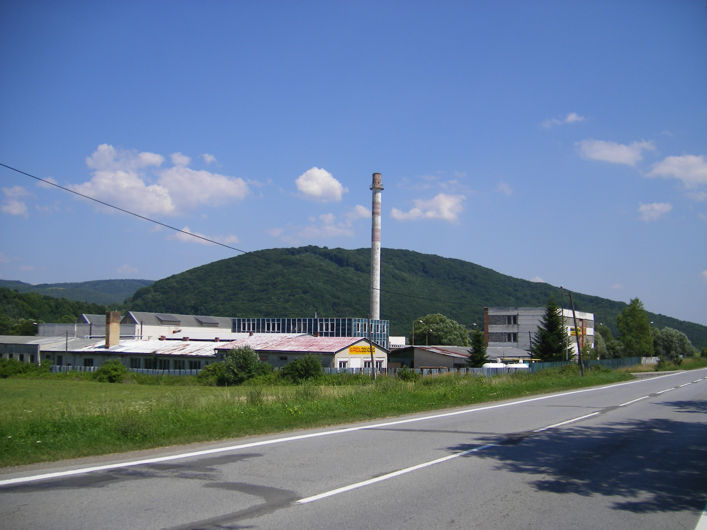 Hanušovce nad Topľou (okres Vranov nad Topľou)